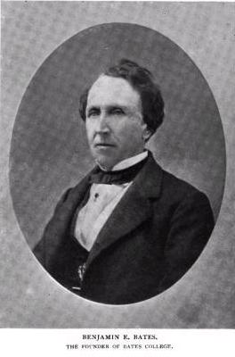 Benjamin Edward Bates (1808–1878)